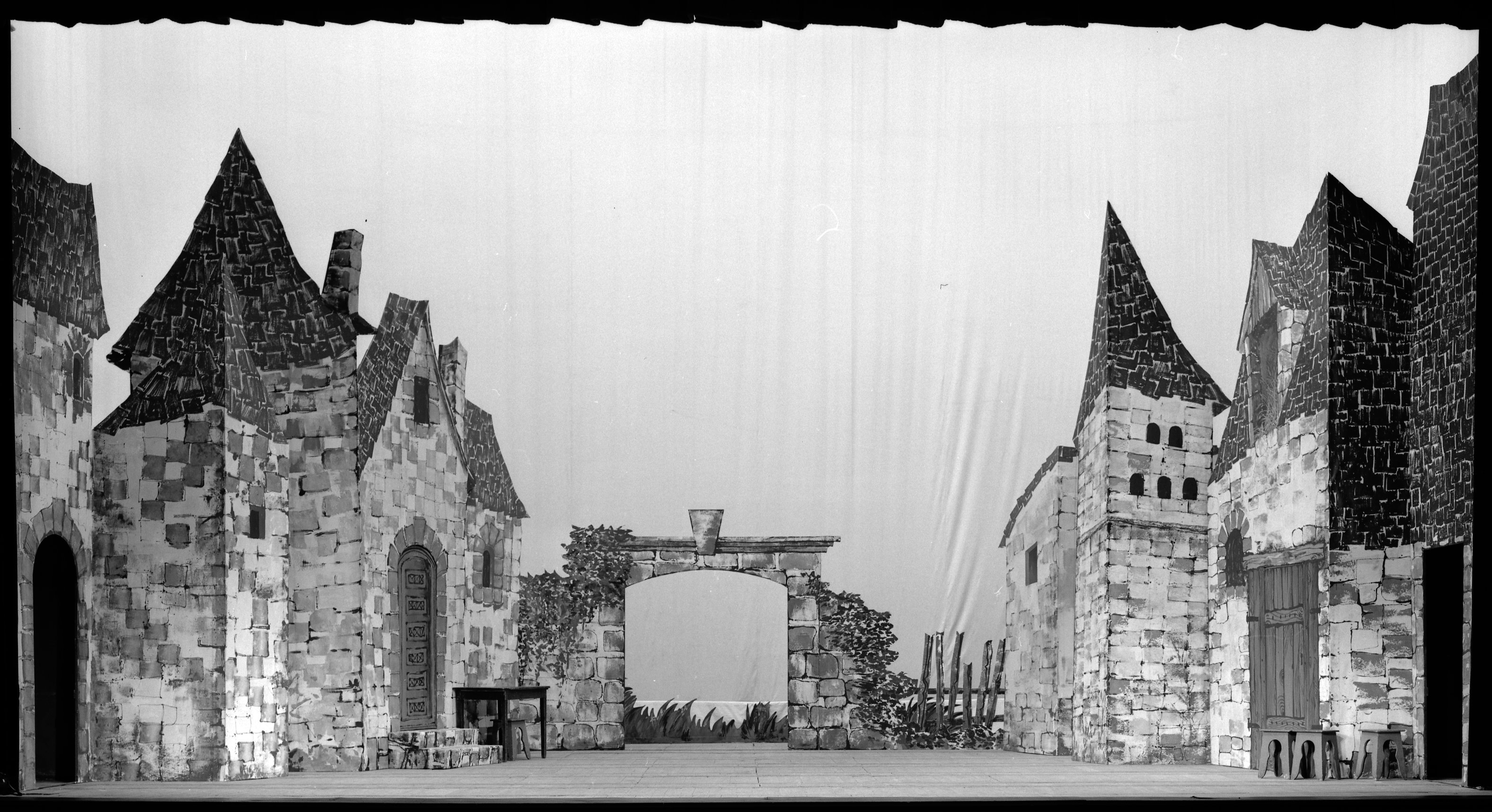 Théâtre du Capitole. Le 28 Mars 1968. Vue du décor des Mousquetaires au couvent au théâtre du Capitole.